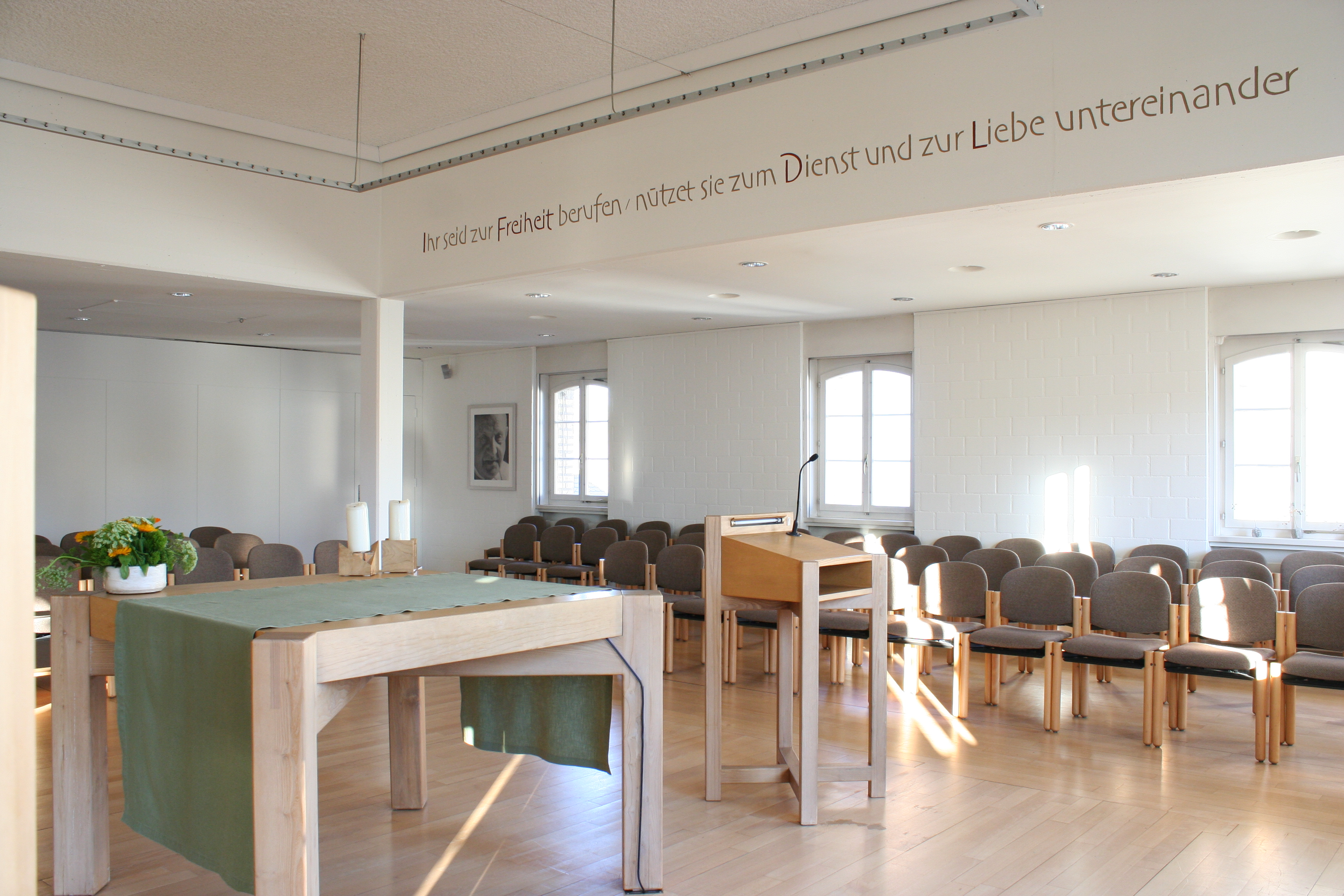 Römisch-katholische Kirche Johannes XXIII. in der Limi Greifensee, Gestaltung von Primo Lorenzetti